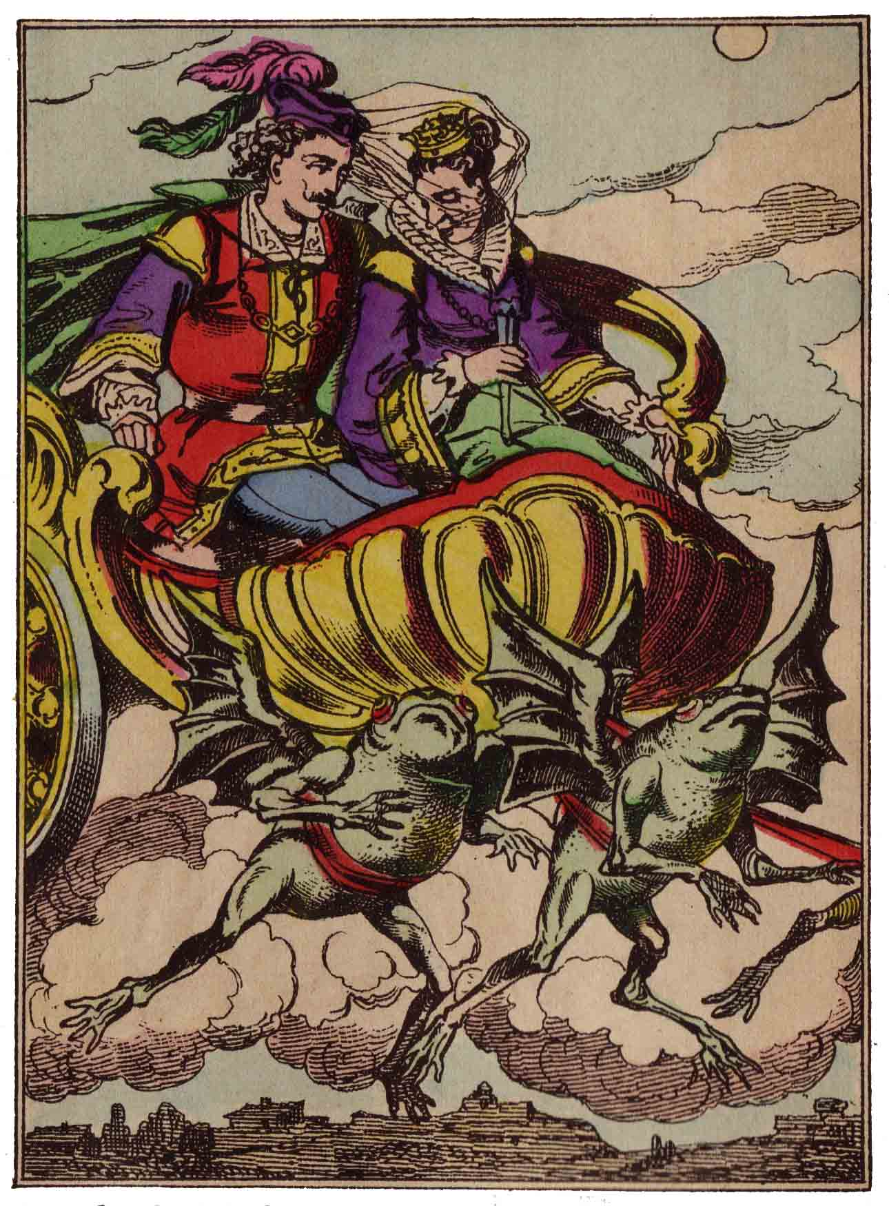 Images d'Épinal : L’Oiseau bleu